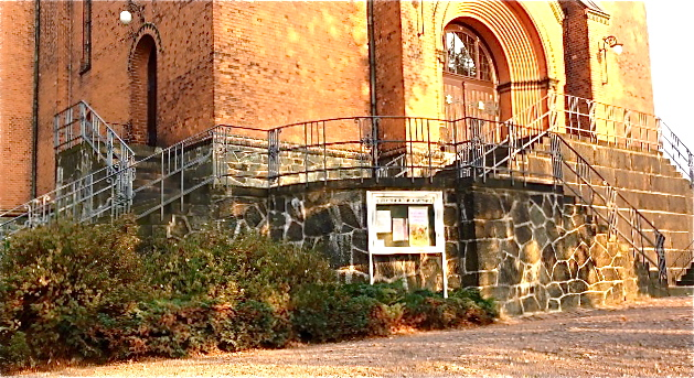 Lutherkirche Harthau, Sockel aus Harthauer Grünstein, Fotografie Dr. Benita Martin